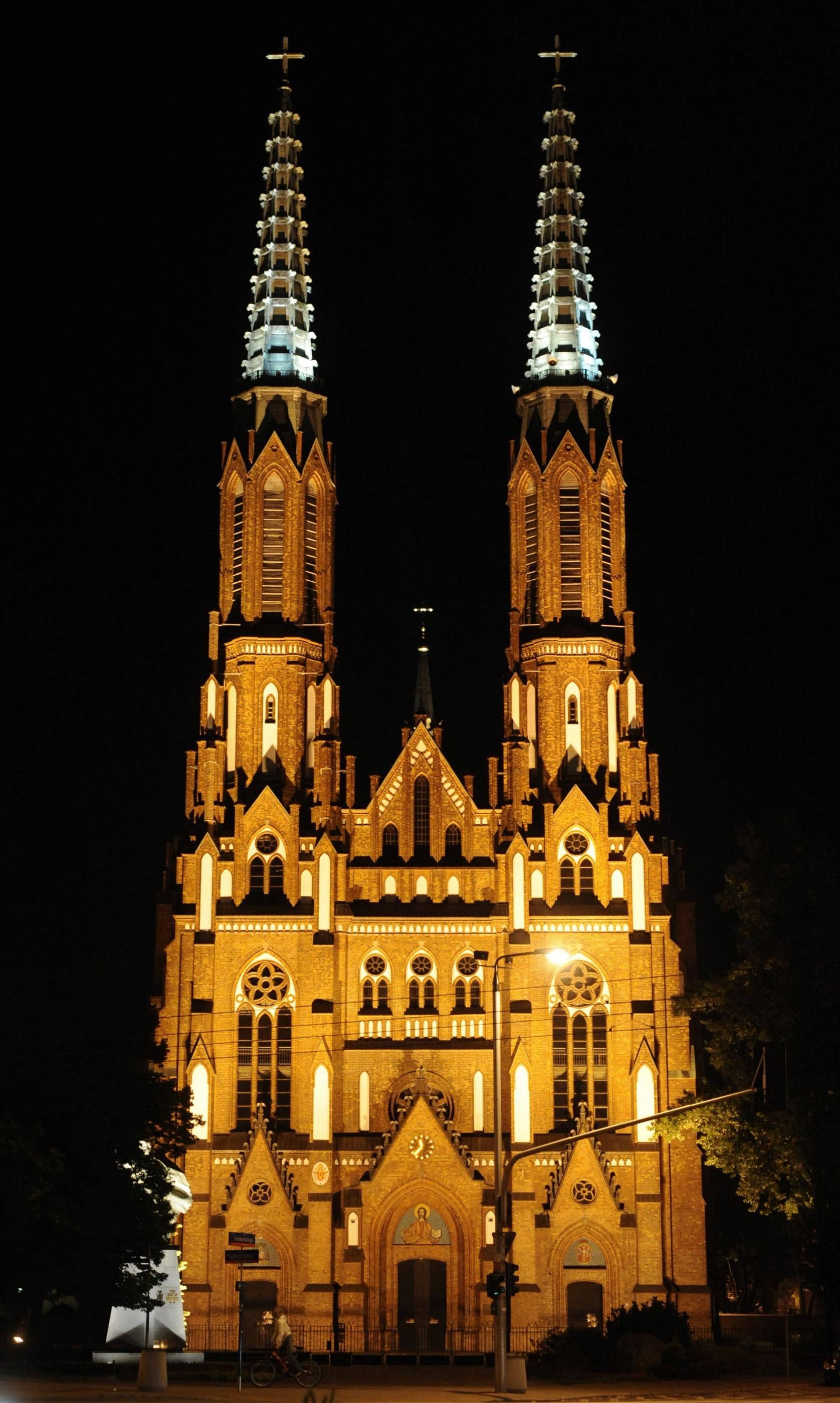 Bazylika katedralna św. Michała i św. Floriana w Warszawie nocą